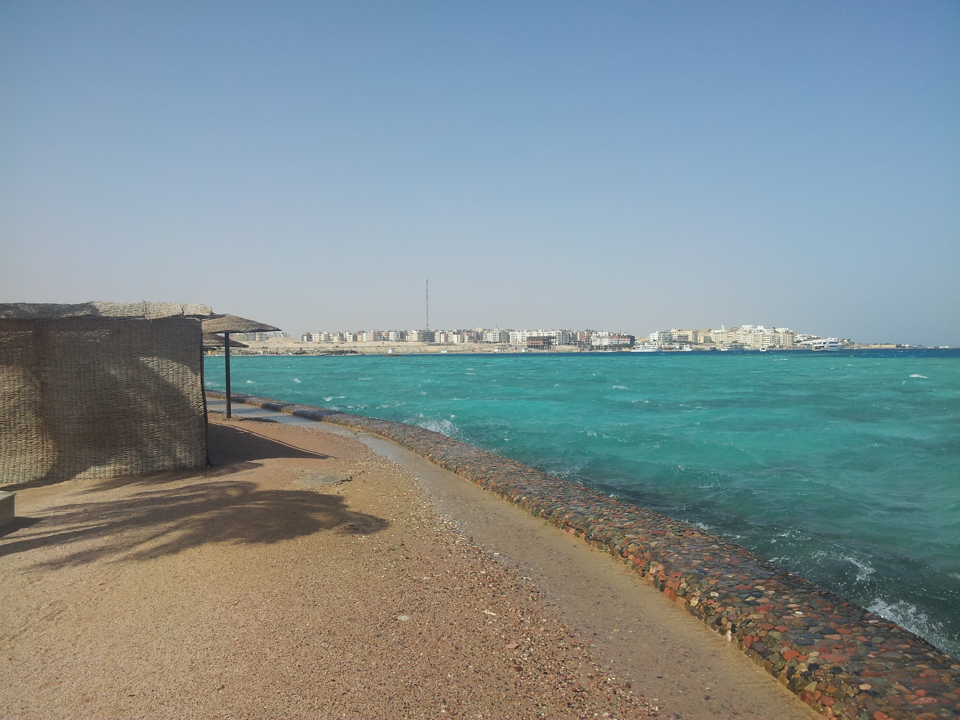 Красное море в Хургаде